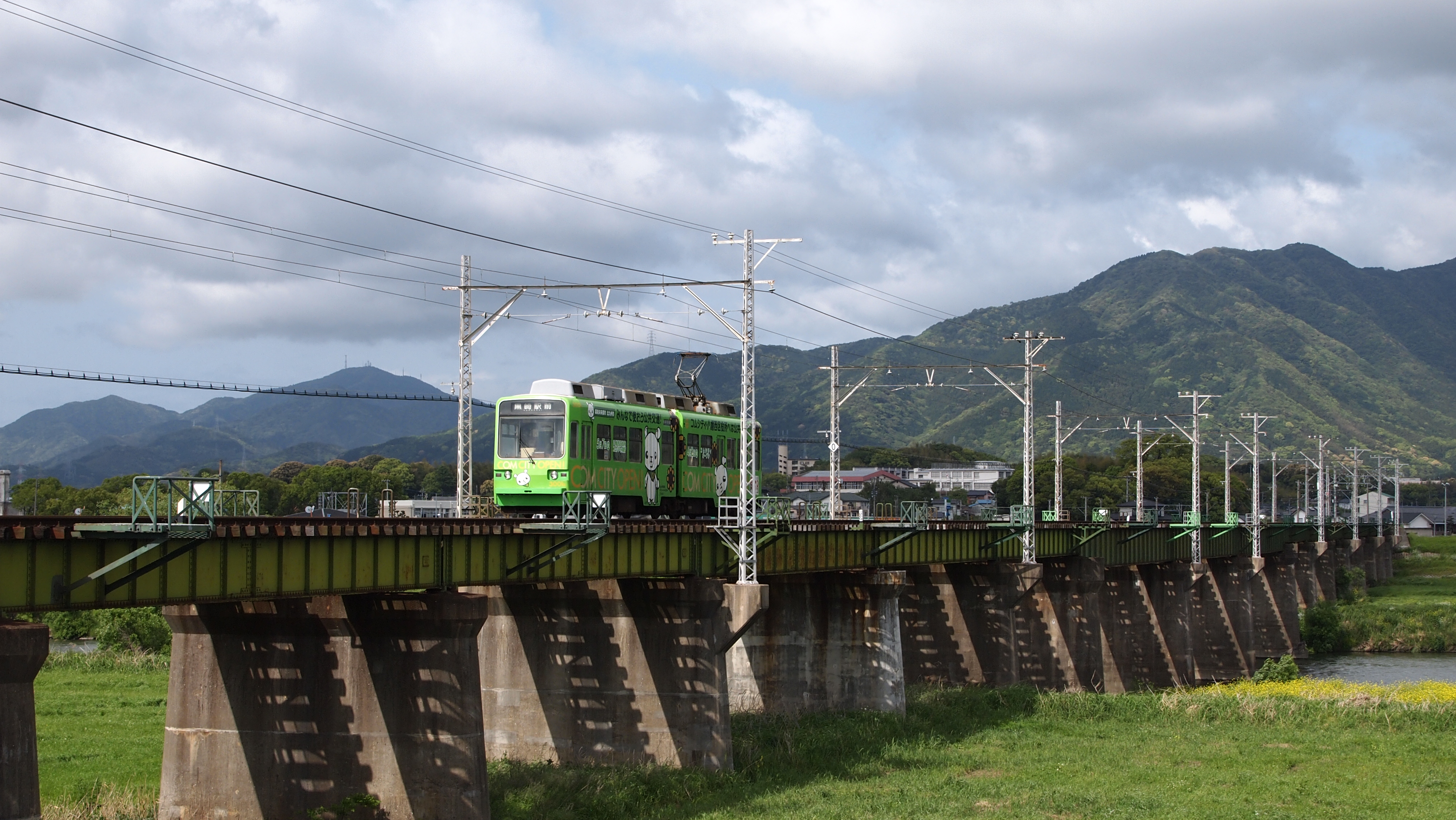 かつての計画をほうふつとさせる遠賀川橋梁